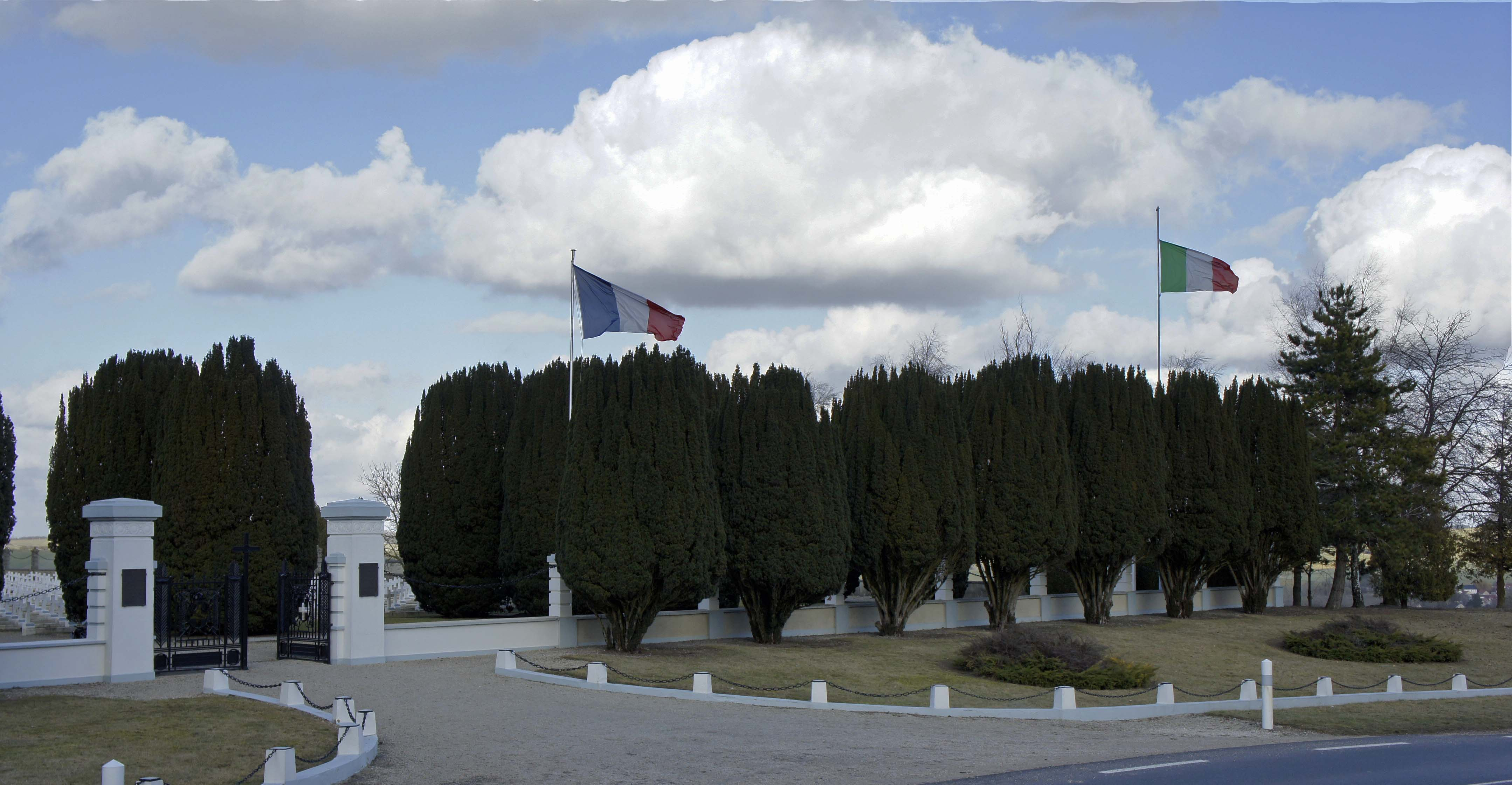 Cimetière italien de Bligny, l'entrée avec les deux drapeaux nationaux.